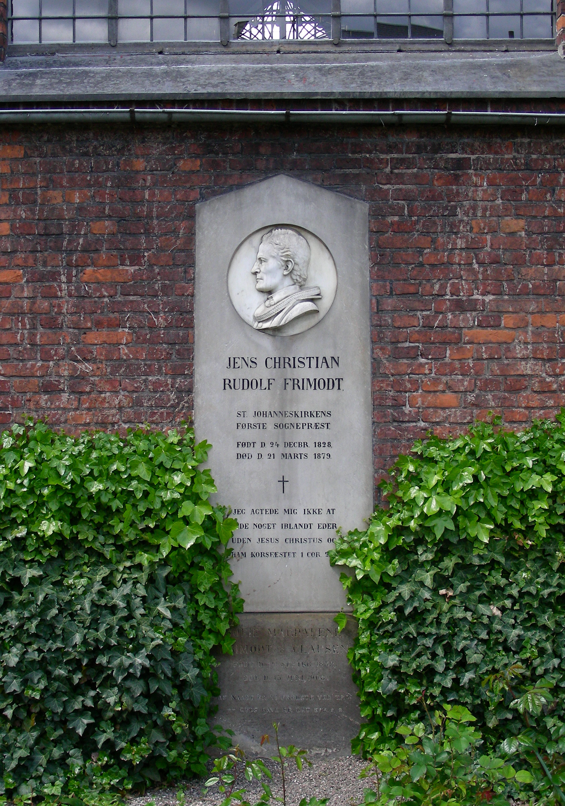 Sankt Johannes Kirke in Copenhagen, Denmark. Memorial for J.C.R.Frimodt.